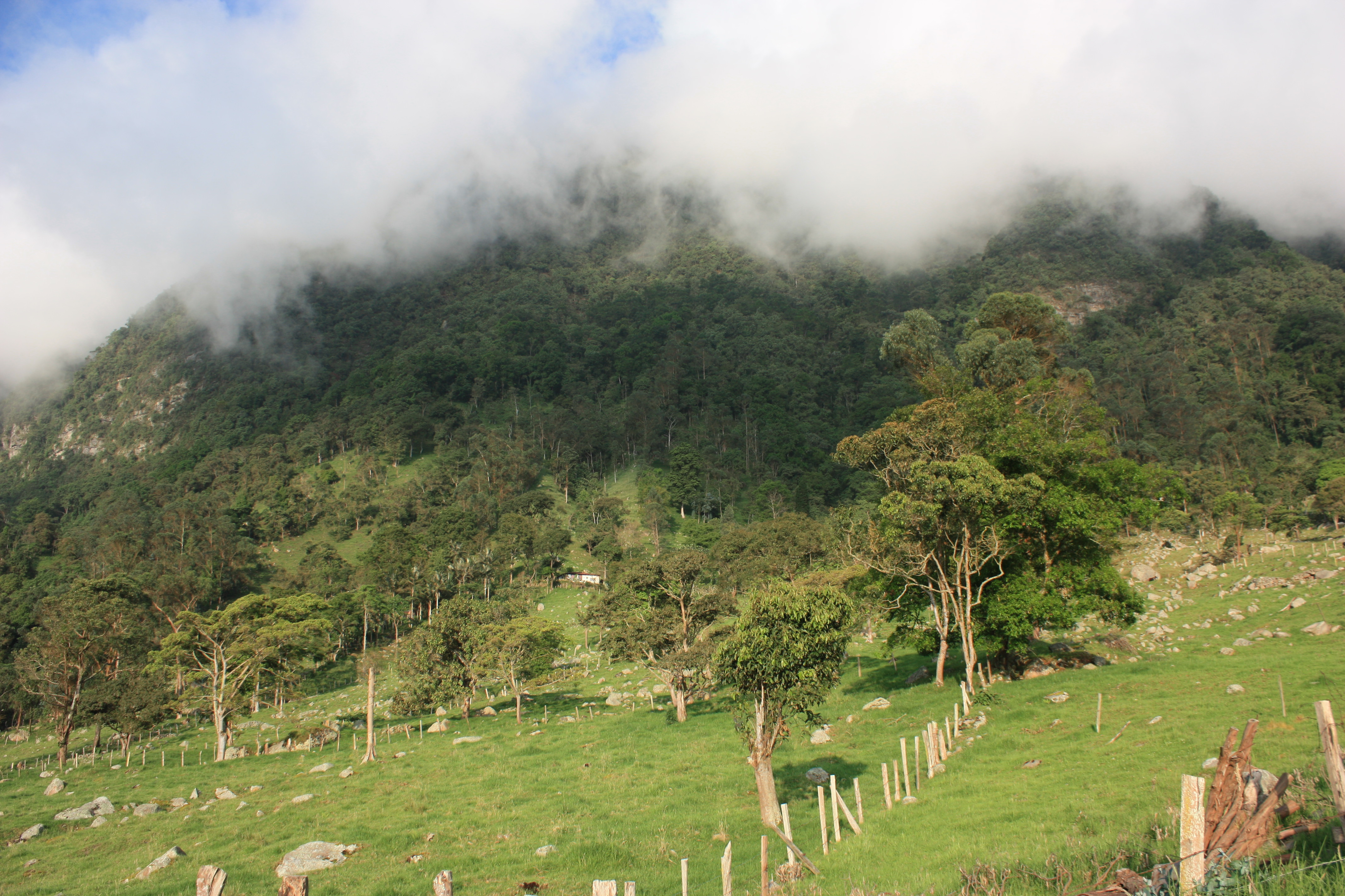 Santandercito Cundinamarca - Vereda Chicaque